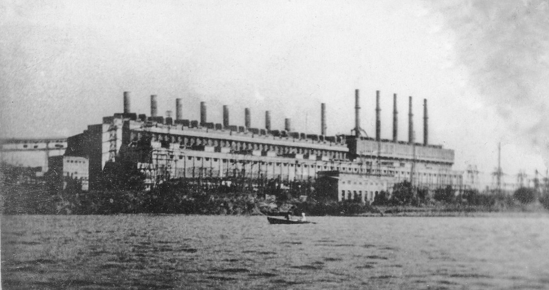 Зуевская ГРЭС в период 100% проектной мощности.